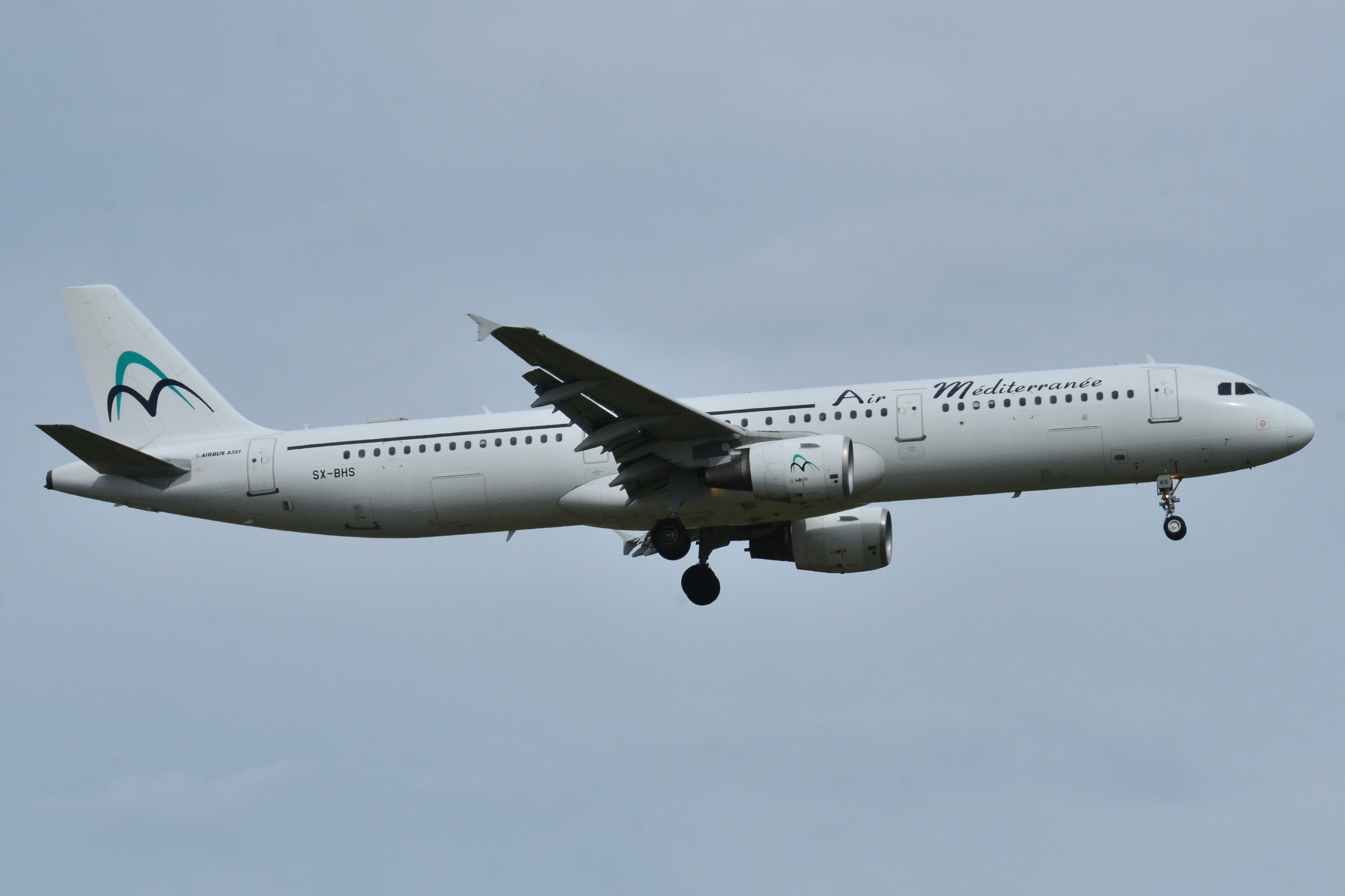 Photo prise à l'aéroport de Toulouse-Blagnac (LFBO) en France. Picture take at Toulouse-Blagnac Airport (LFBO) in France.